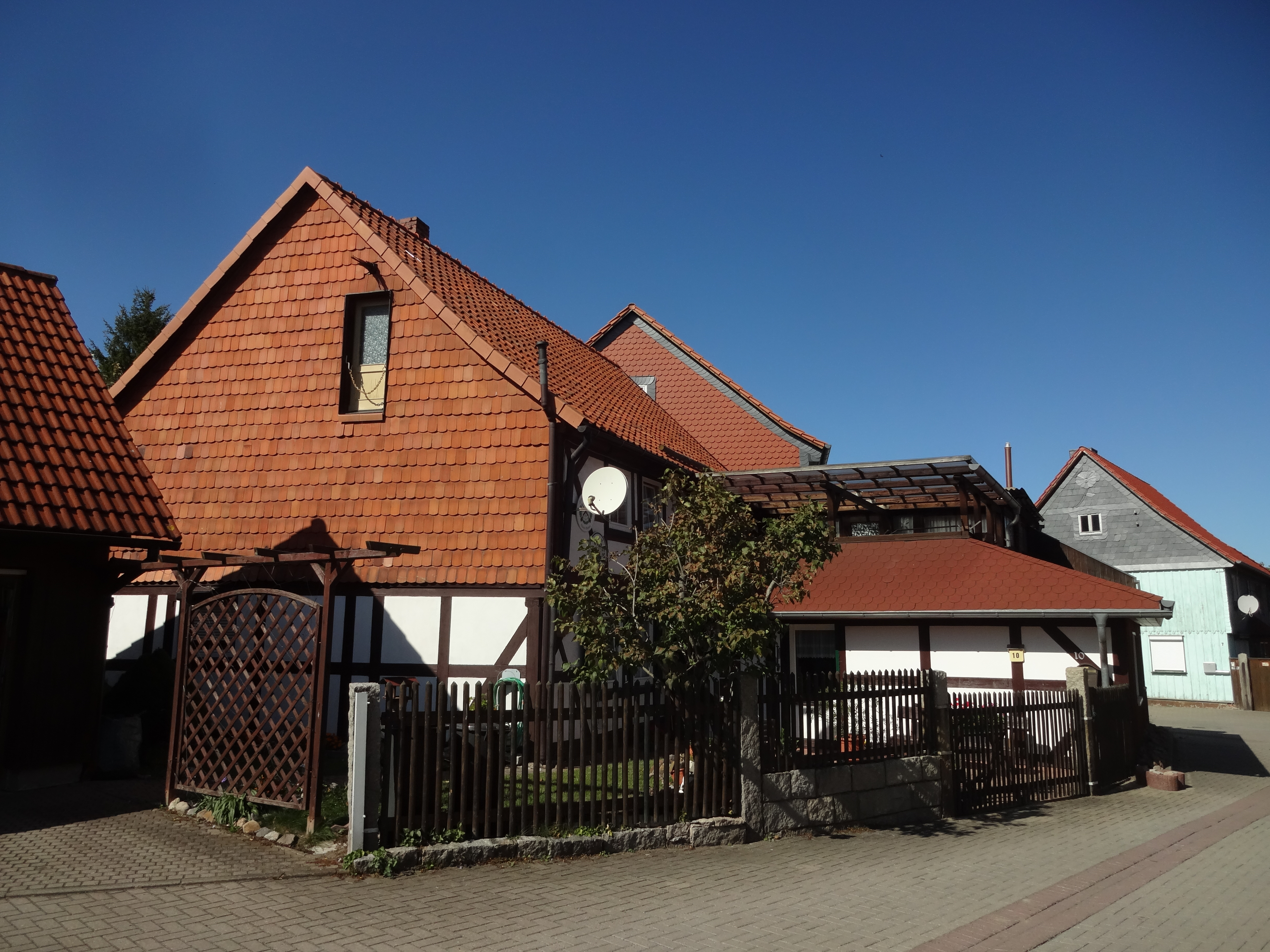 denkmalgeschütztes Wohnhaus in der Schulstraße 10 in Drübeck